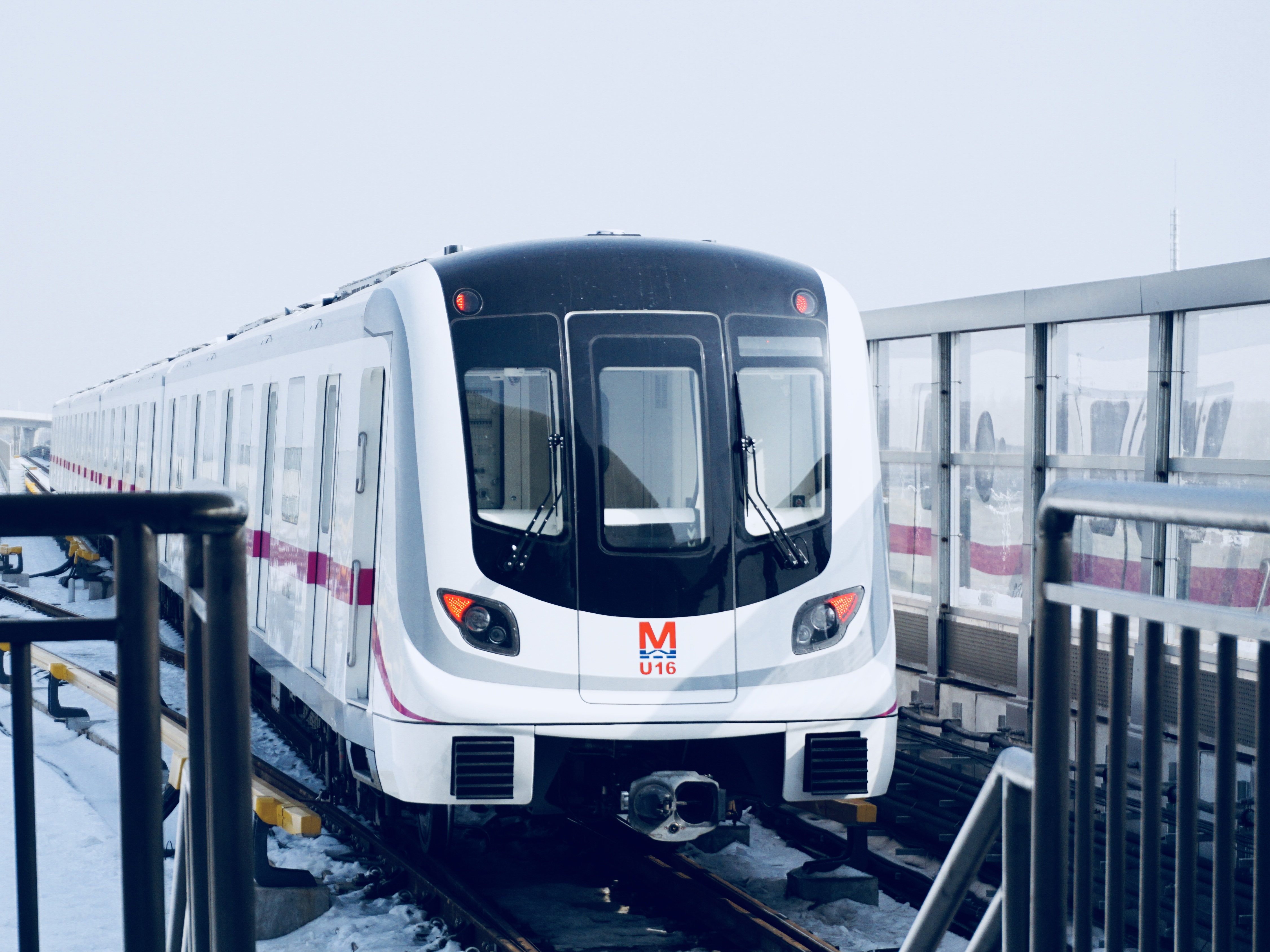 武汉轨道交通阳逻线列车，摄于武湖站。